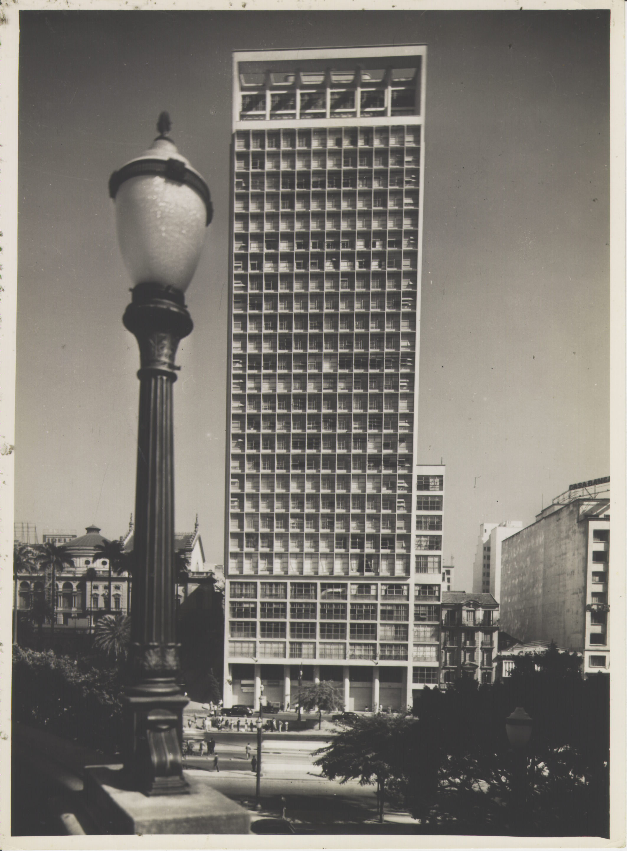 Obra que integra o acervo do Museu Paulista da USP. Coleção Werner Haberkorn